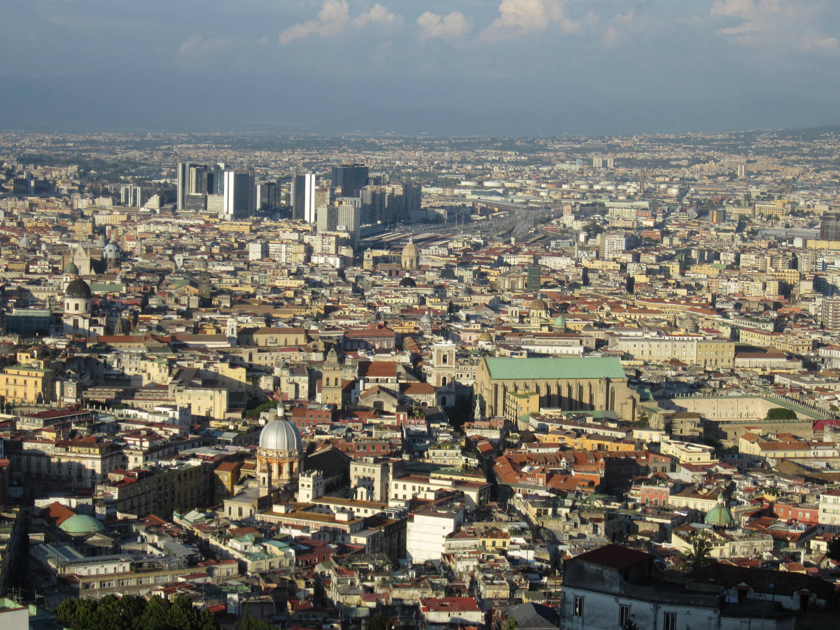 Veduta di Napoli dal Vomero